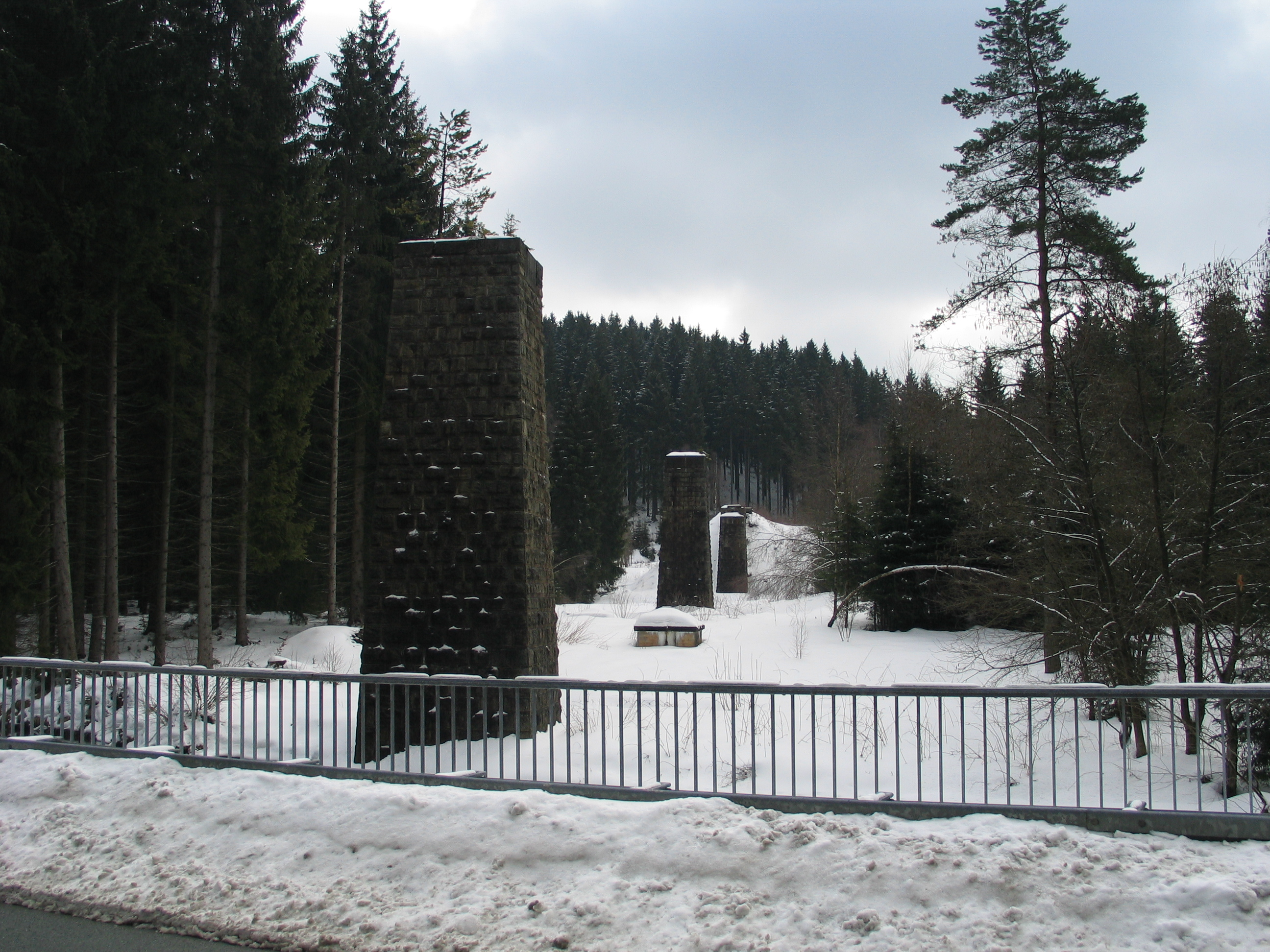 Zwei Brückenpfeiler und ein Widerlager der ehemaligen Eisenbahnbrücke über das Tal der Zwickauer Mulde; zur Schmalspurstrecke Saupersdorf - Wilzschhaus - Schönheide gehörend, von orts- und verkehrsgeschichtlicher Bedeutung, landschaftsbildprägend.